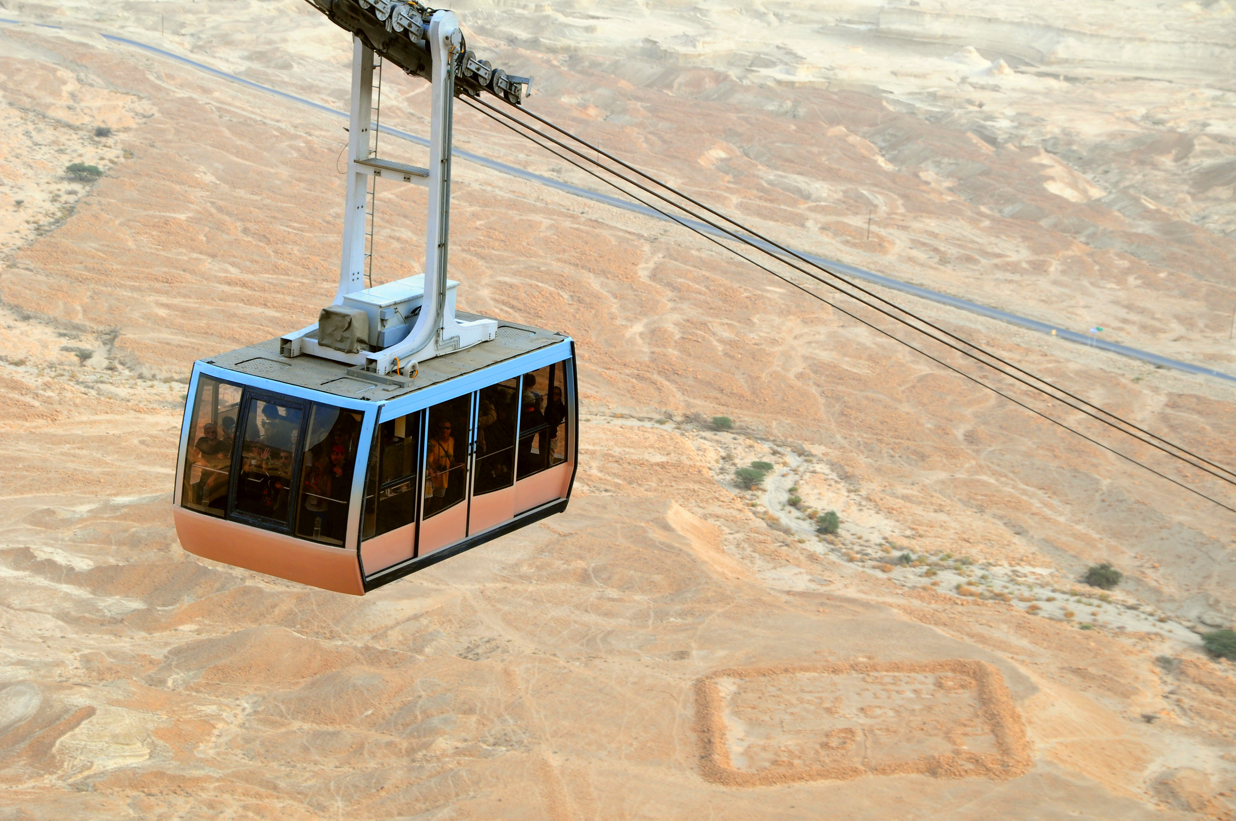 16292 Masada